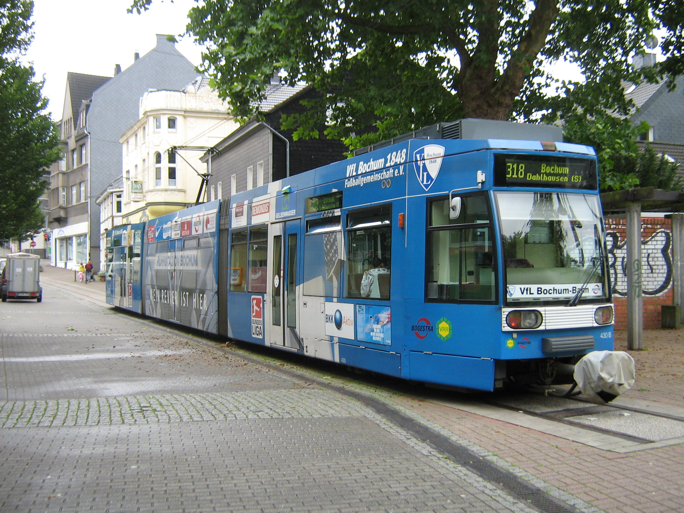 Straßenbahn der Linie 318 an der Endstelle Bochum-Dahlhausen Bf